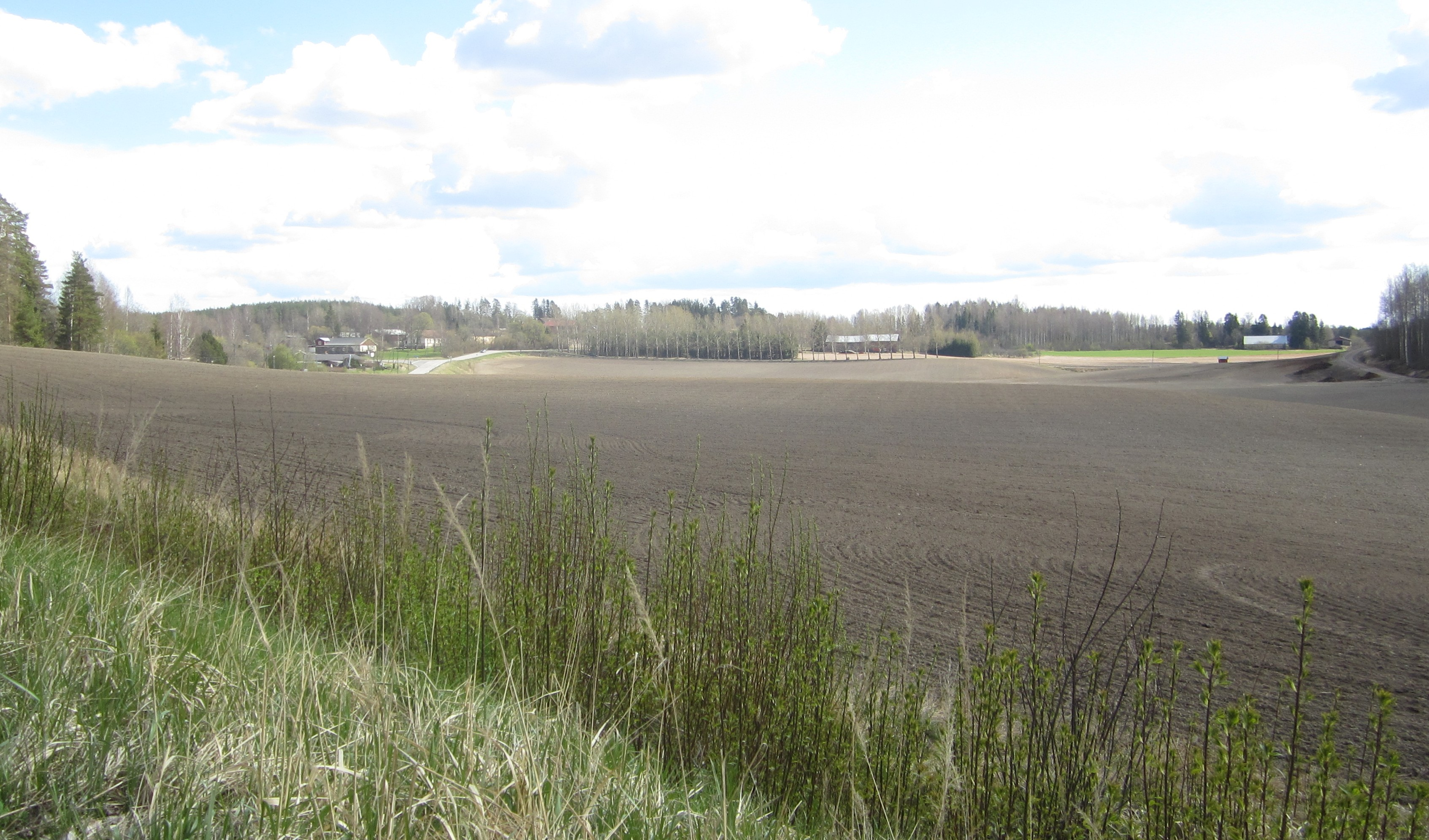 Ikkalassa